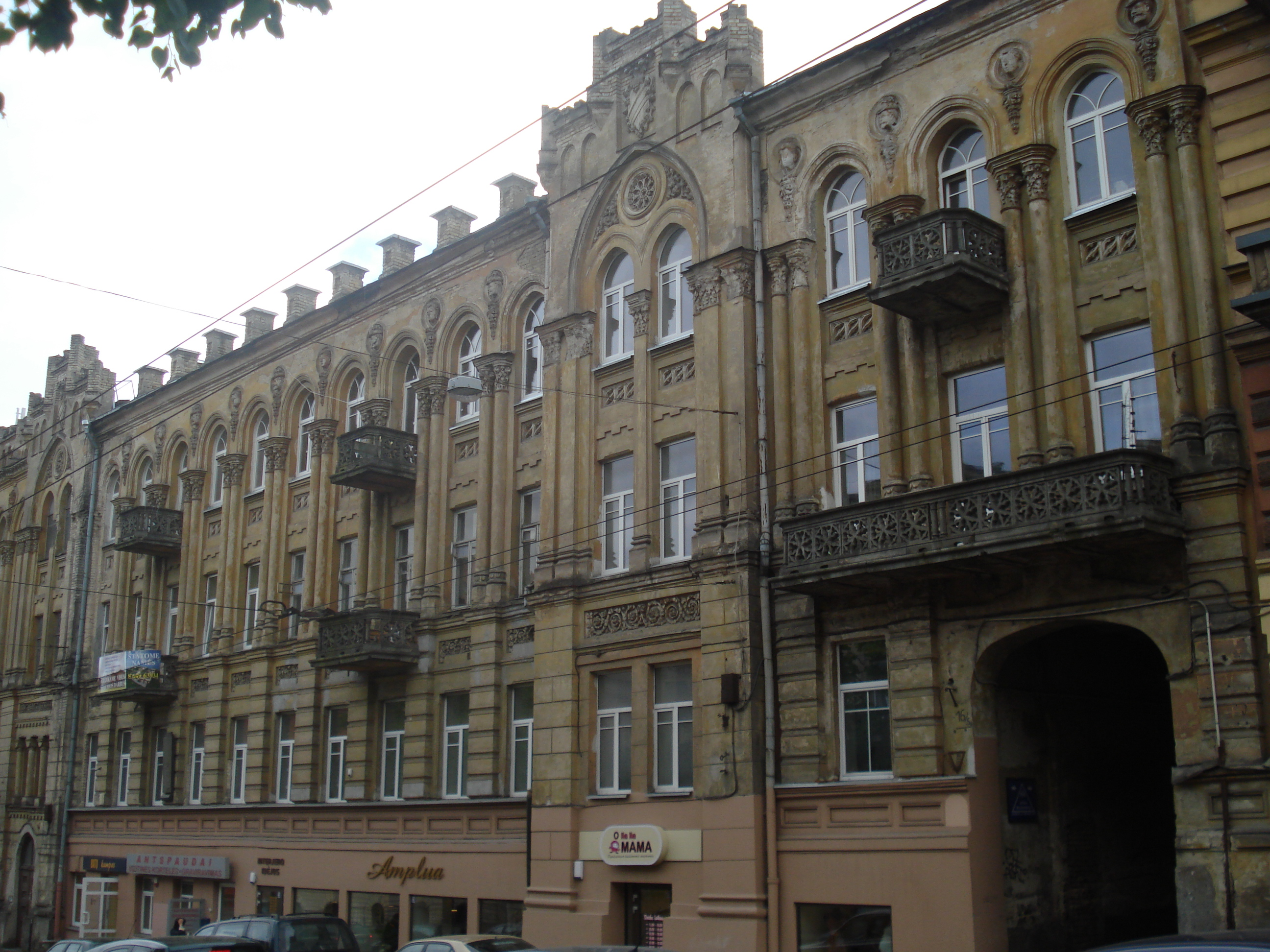 Jono Basanavičiaus gatvė 16 in Vilnius